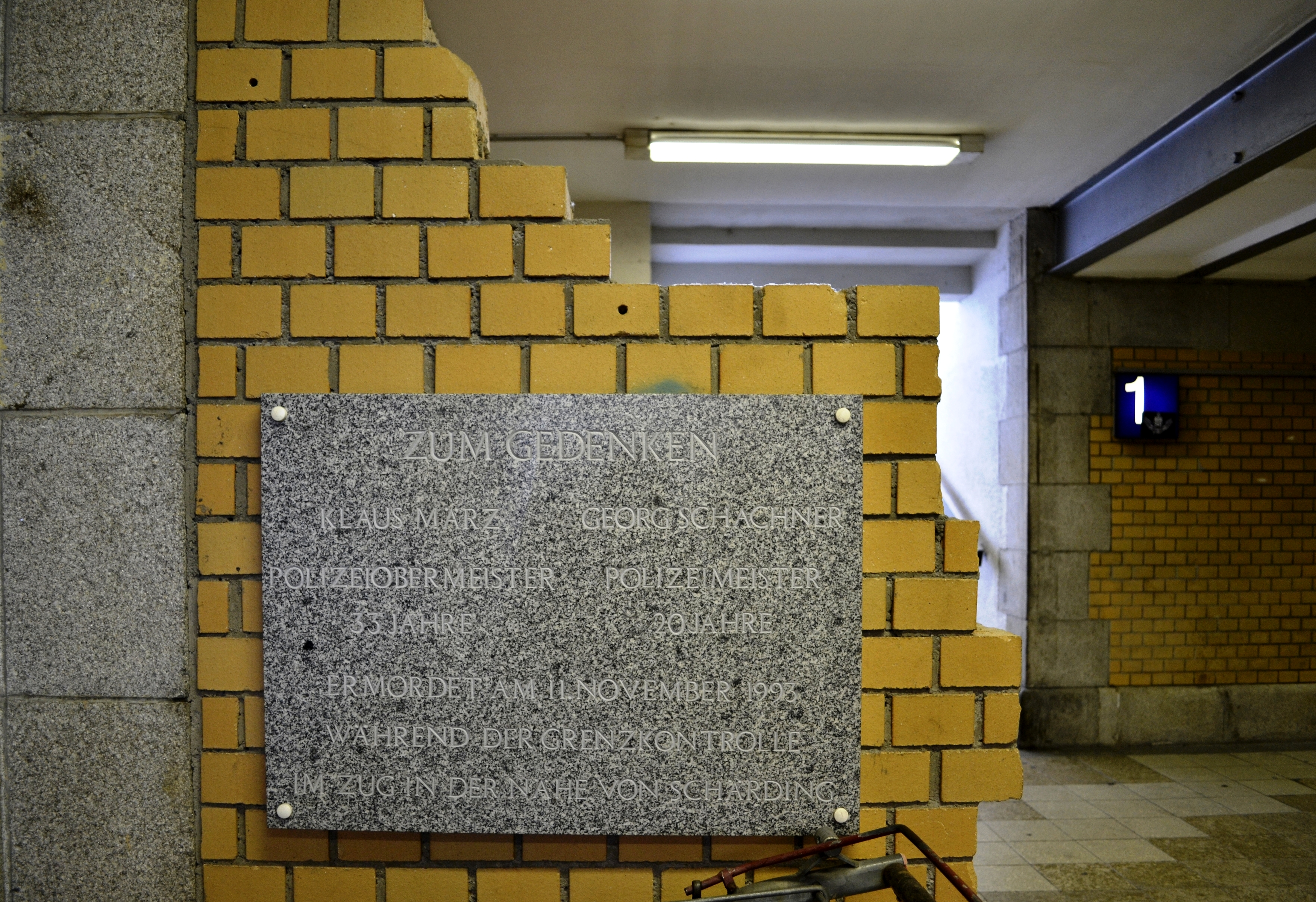 Gedenktafel im Hauptbahnhof Passau an zwei ermordete Polizisten im Jahr 1993.